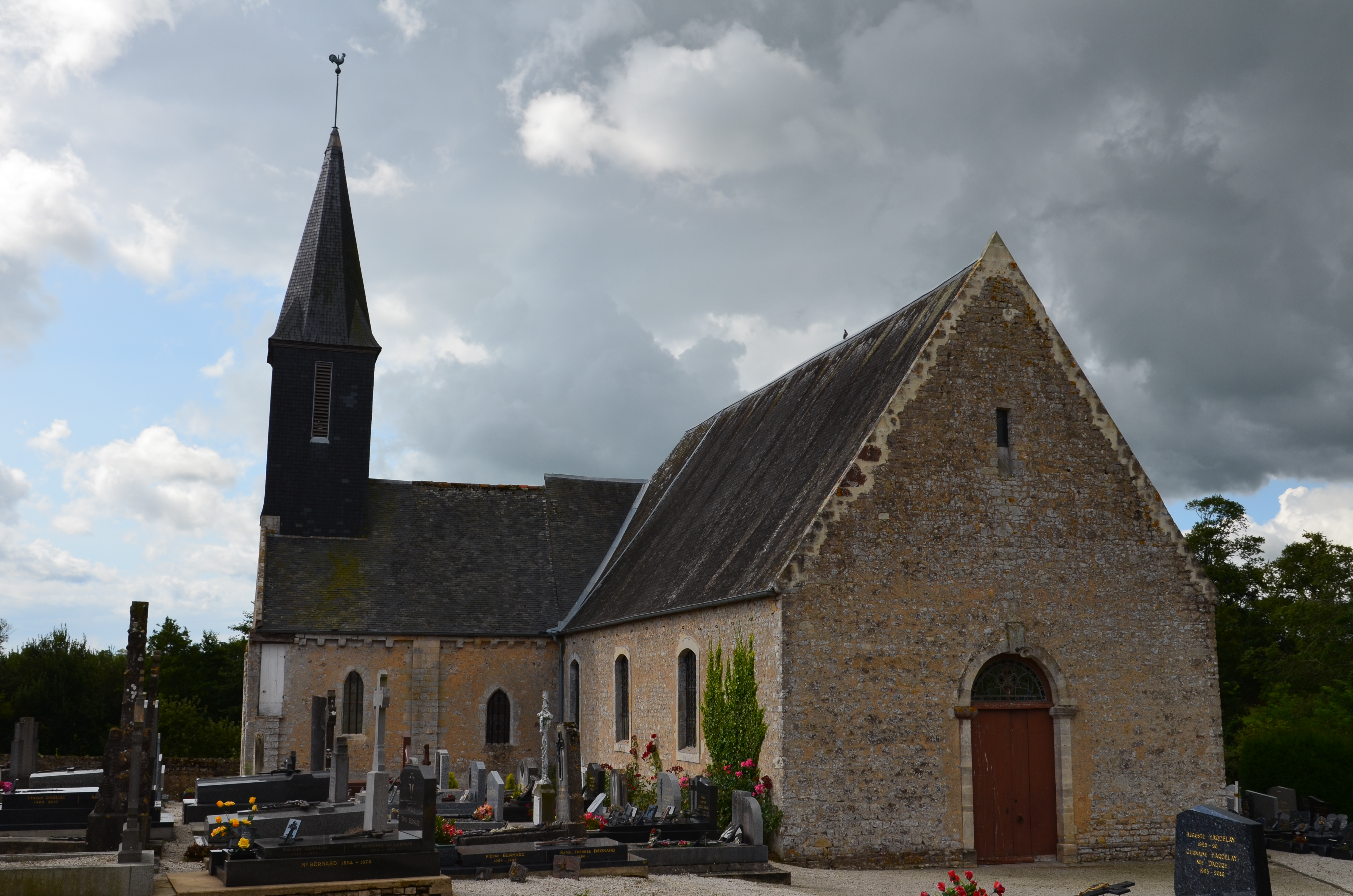 Église Sainte-Marie-Magdeleine de Les Oubeaux.